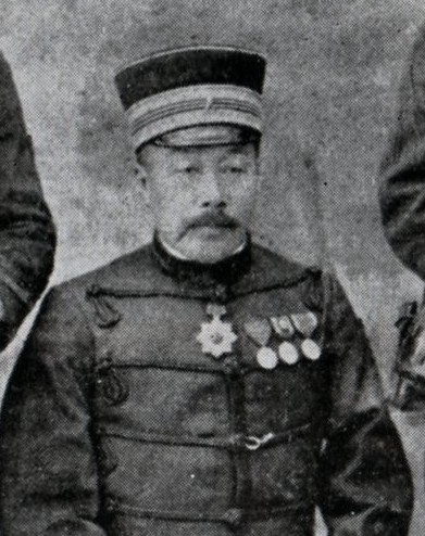 Noda Hiromichi is an Imperial Japanese Army Paymaster General